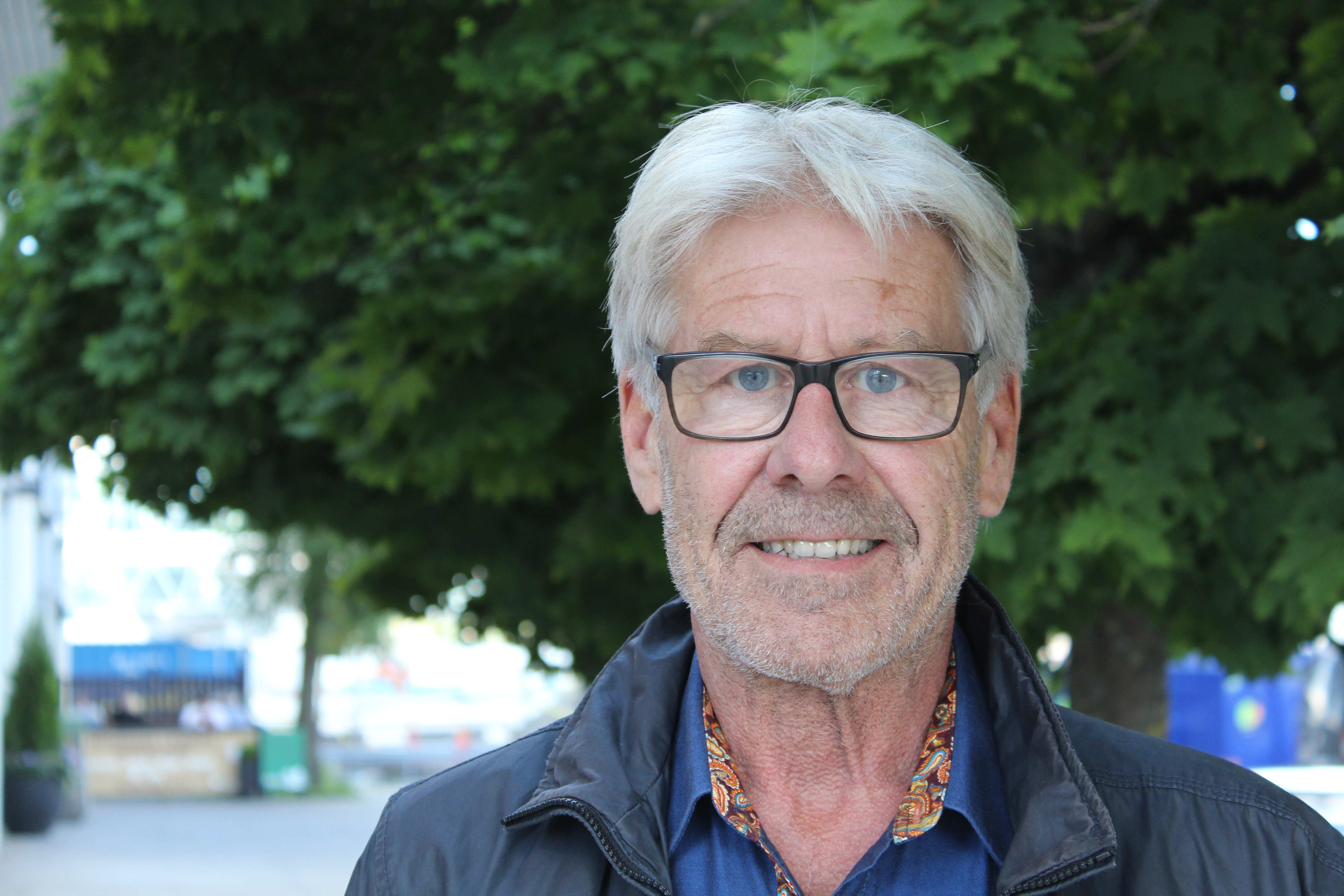 Travkusken Lennart Forsgren.